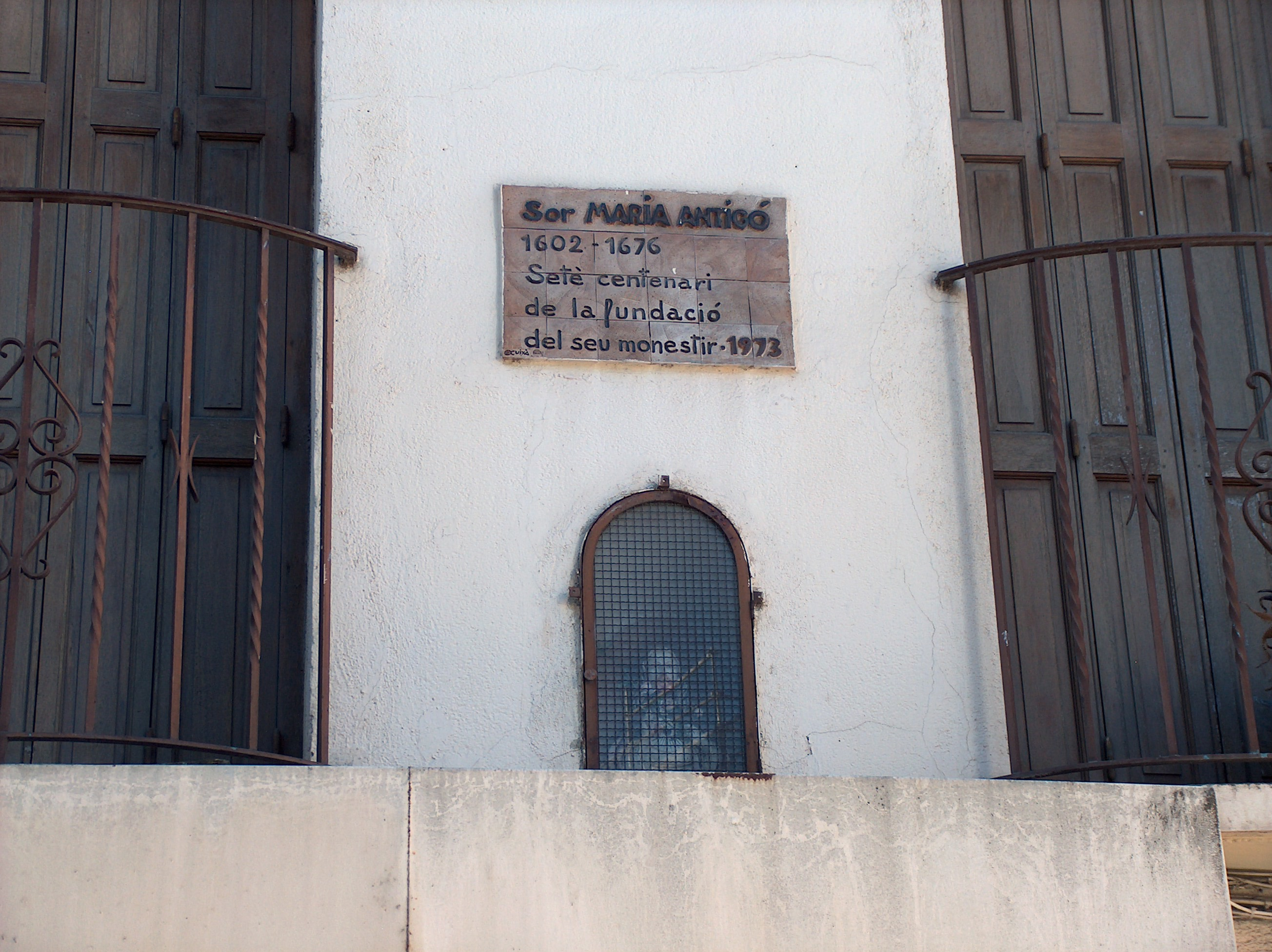 Quartier Saint-Jacques. Icône dans une niche et plaque commémorative installée en 1973 pour Sor Maria Antigó (la religieuse Anne Marie-Antigo).